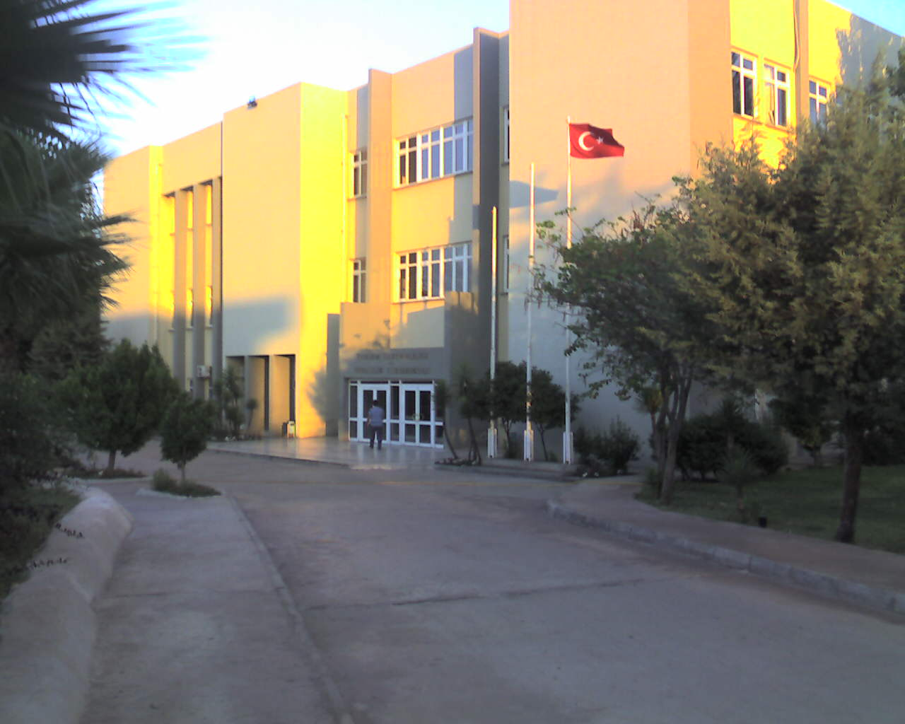 Kendim çektim.